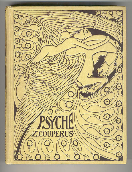 Boekomslag: "Psyche". 4e druk 1916 (ontwerp: 1898). Auteur: L. Couperus. Bandontwerp: J. Toorop. Uitgeverij: L.J. Veen.